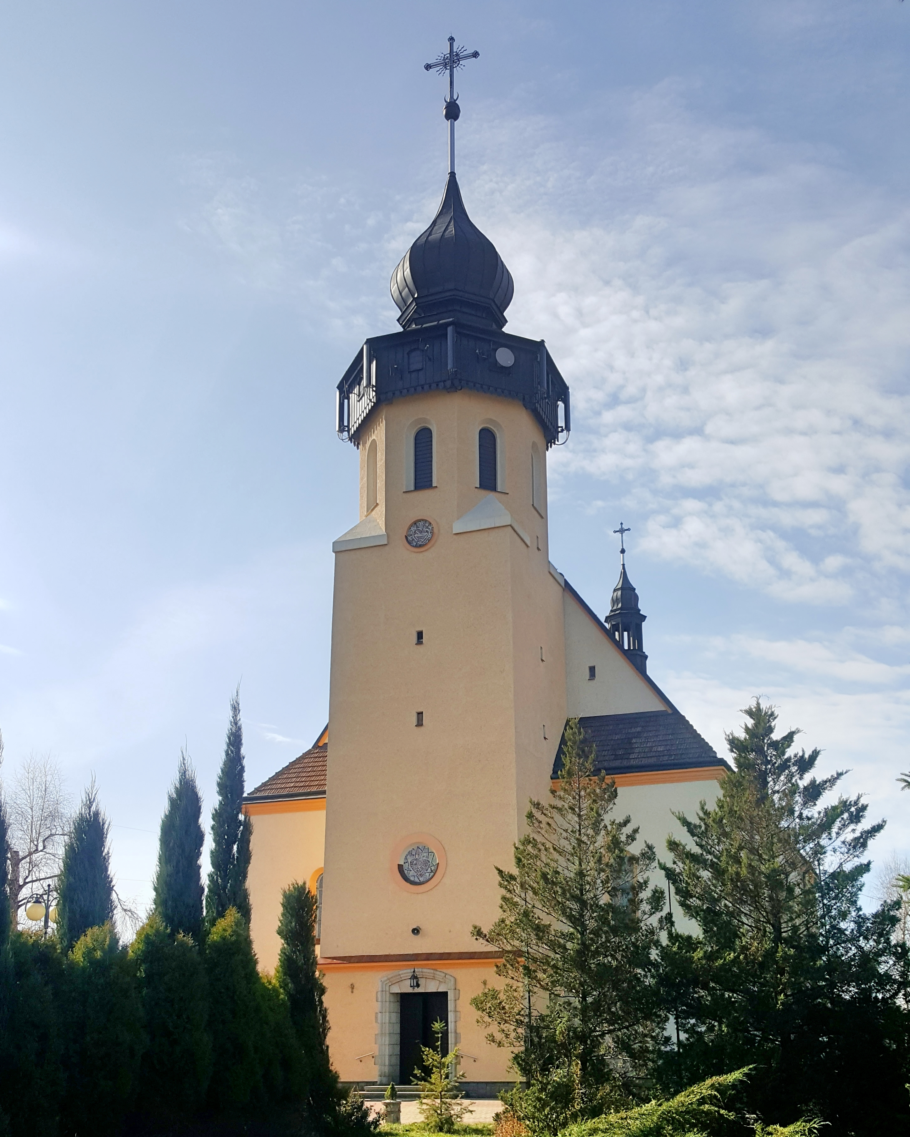 Kościół Niepokalanego Serca Najświętszej Maryi Panny w Tarnowie